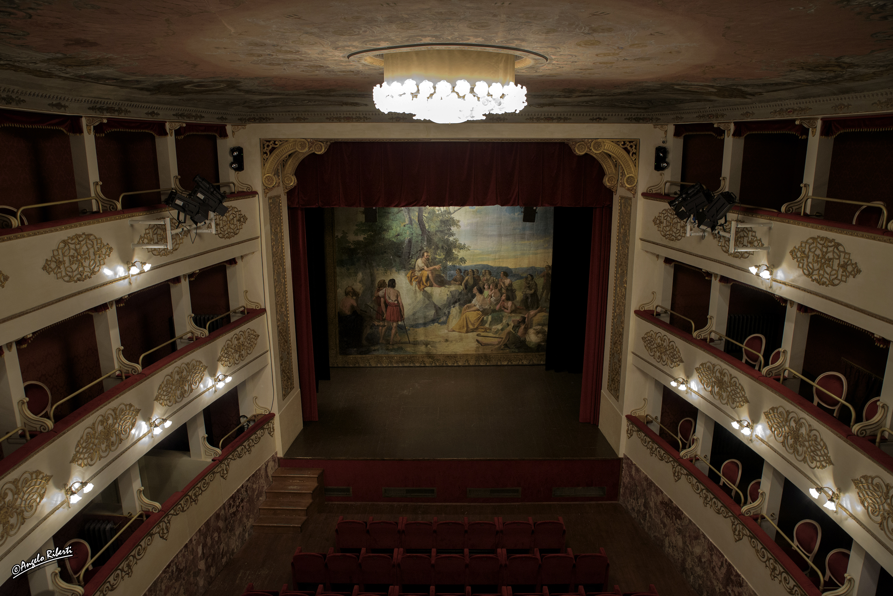 Teatro comunale Alice Zeppilli - Museo della Musica This is a photo of a monument which is part of cultural heritage of Italy.